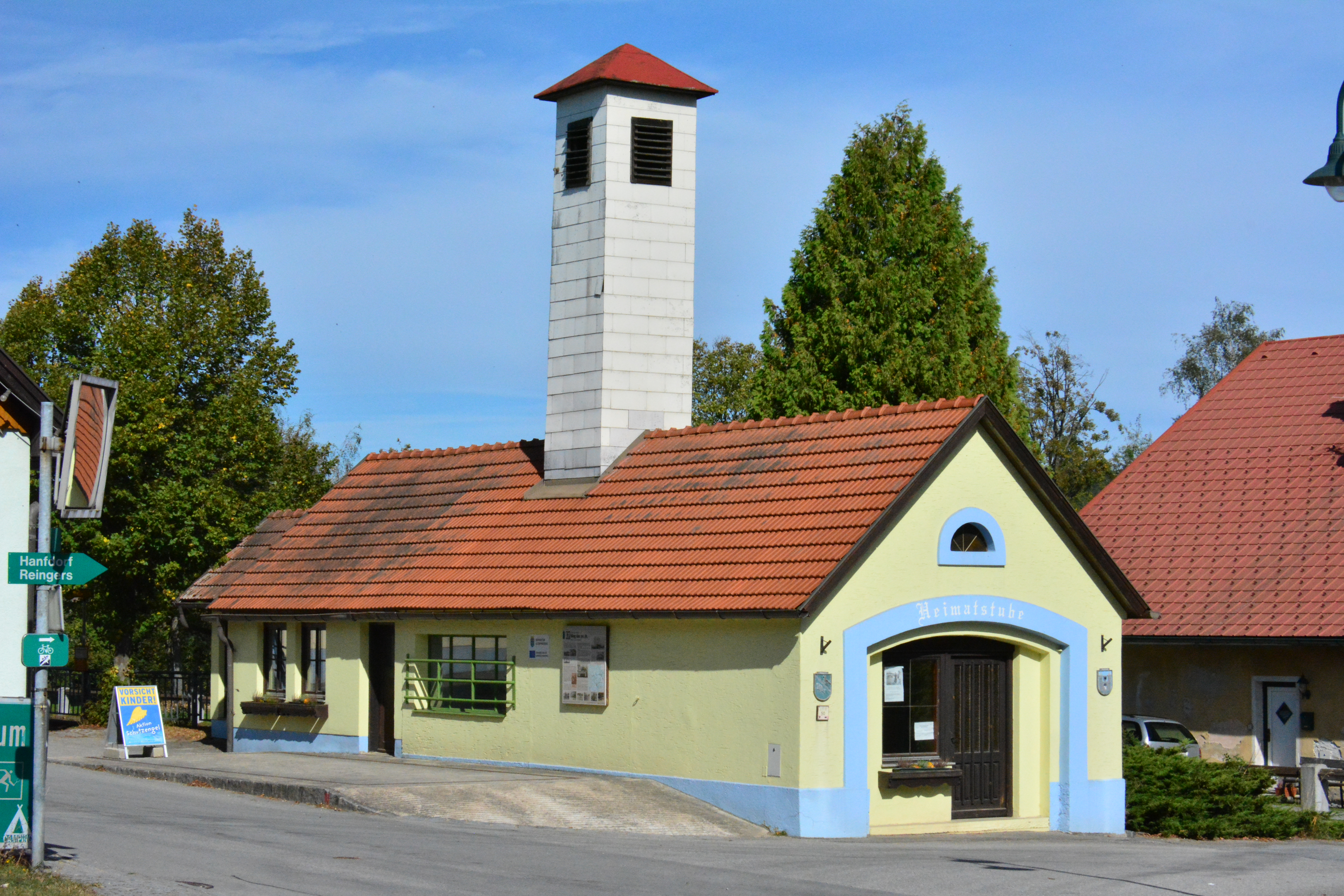 Früher Feuerwehrhaus, heute als “Heimatstube” ein Museum über das Leben im und die 1945 erfolgte Vertreibung aus dem Bezirk Neubistritz / Nová Bystřice.